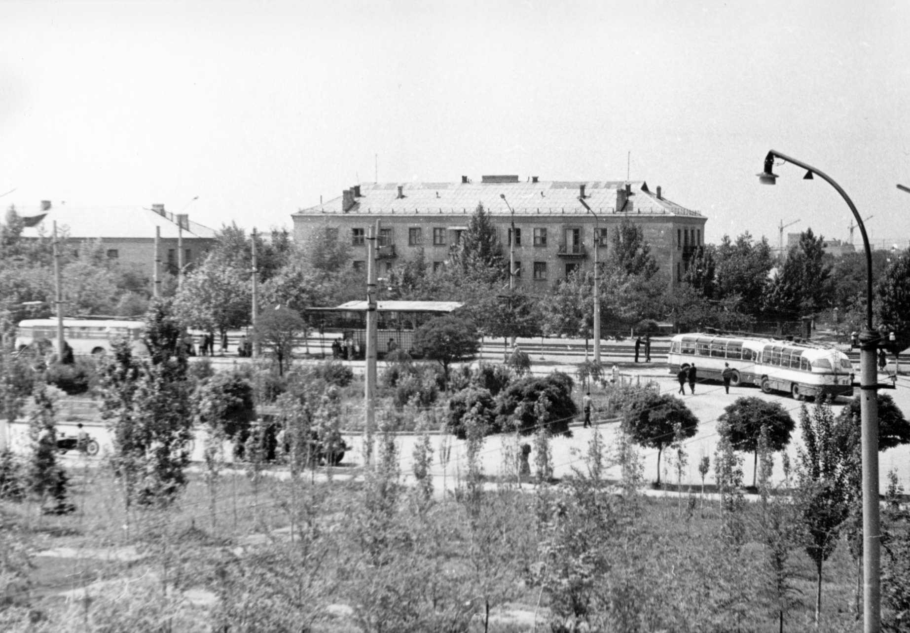 Начало шестидесятых. Первые троллейбусы Луганска на кольце возле "Дома Обороны"